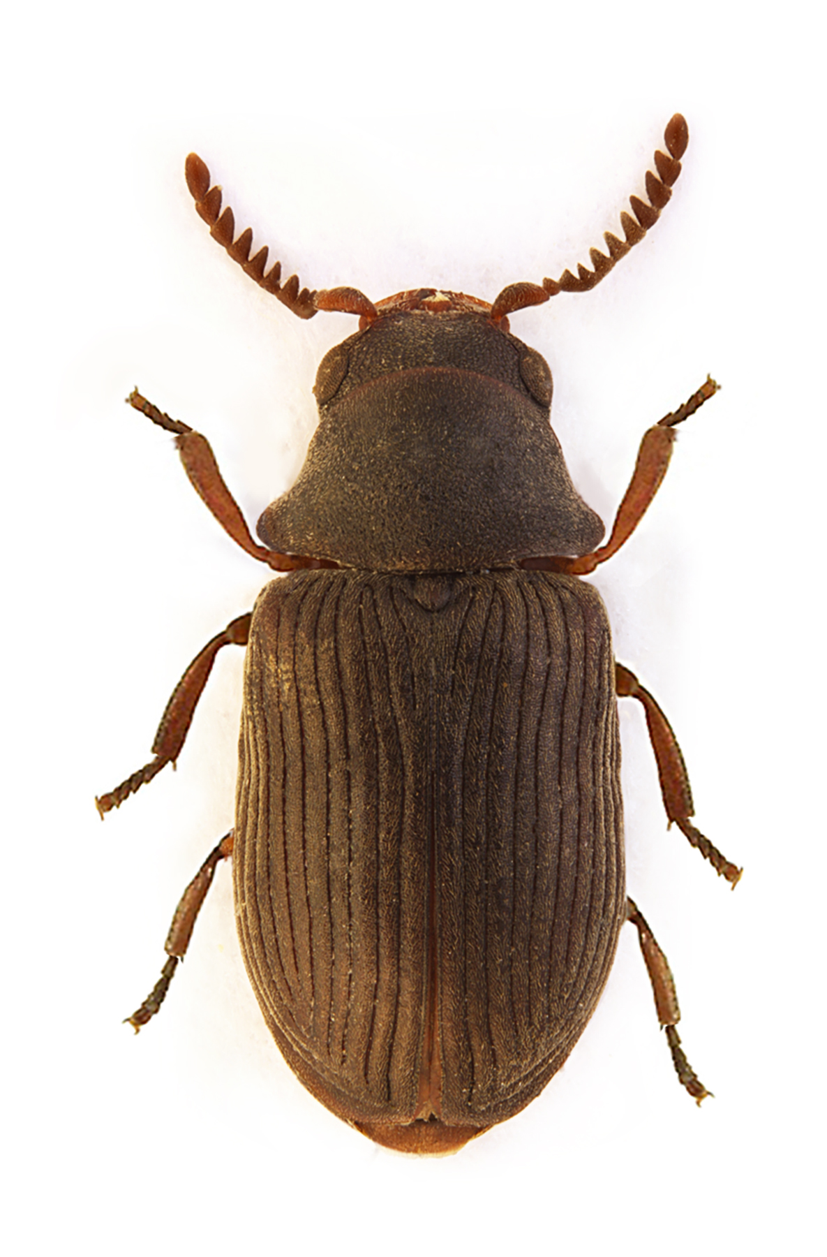 Xyletinus ater